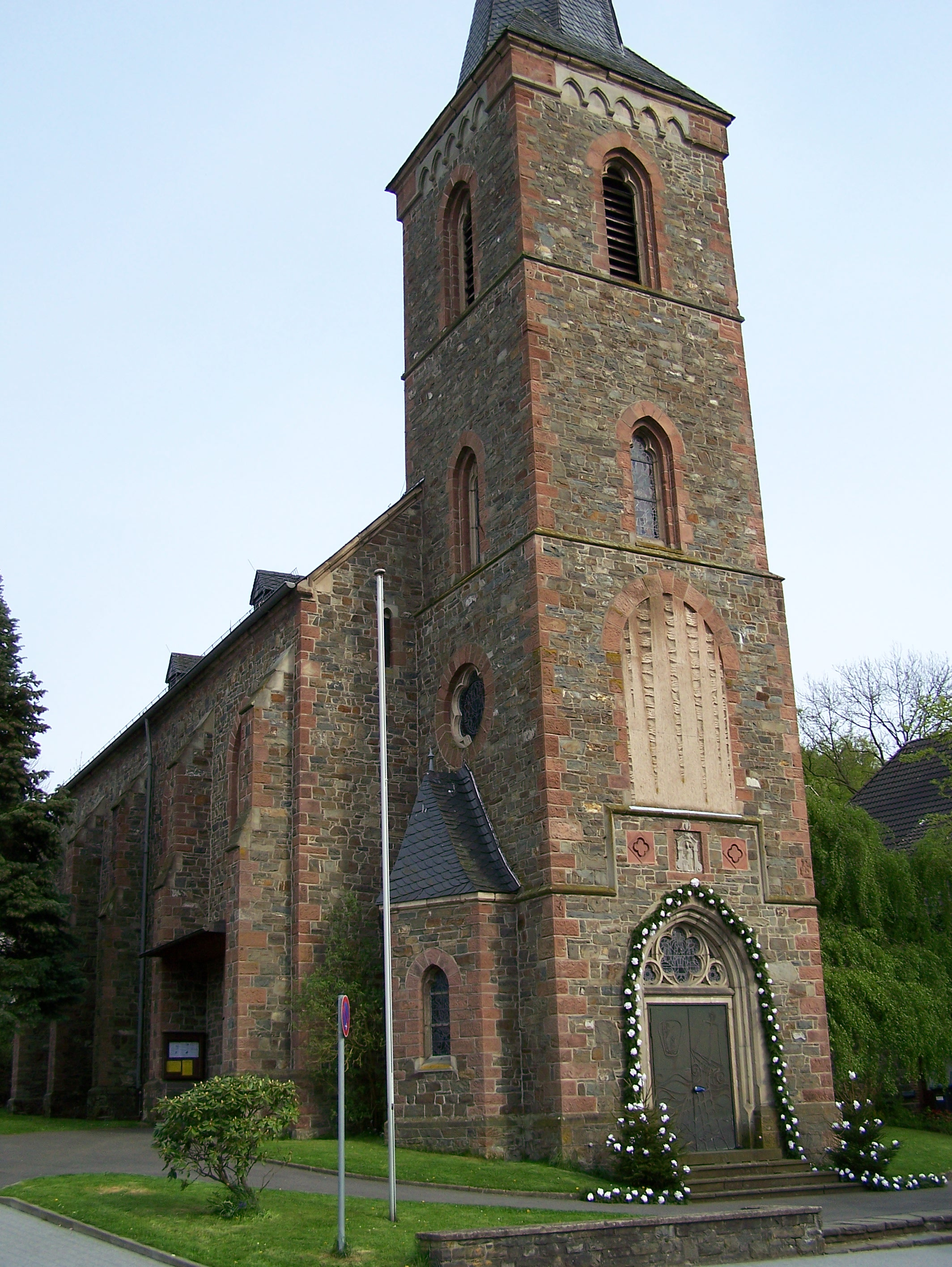 Pfarrkirche St. Nikolaus